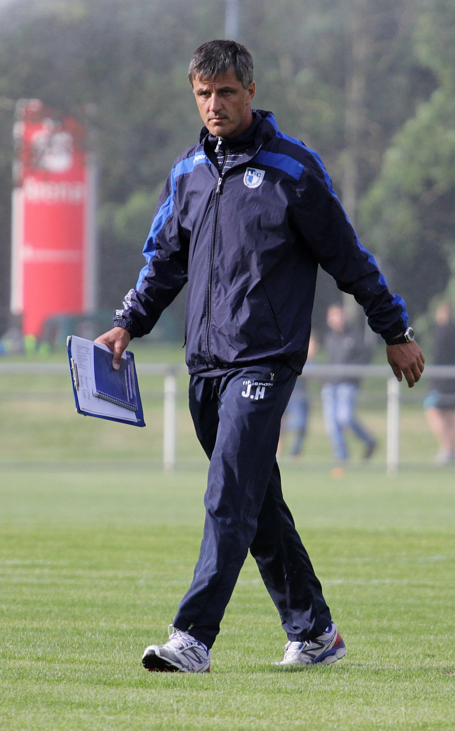 Jens Härtel